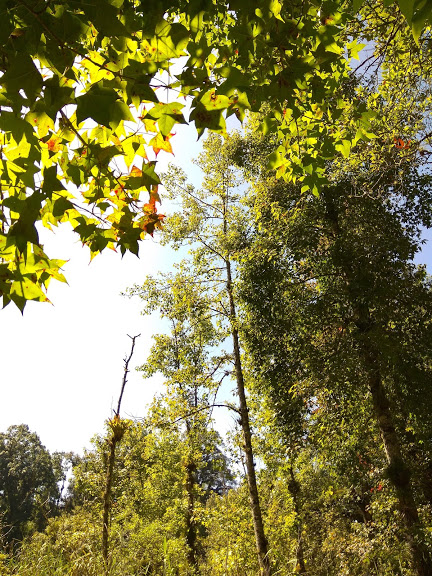 Uno de los arboles que mas dan vida a la region